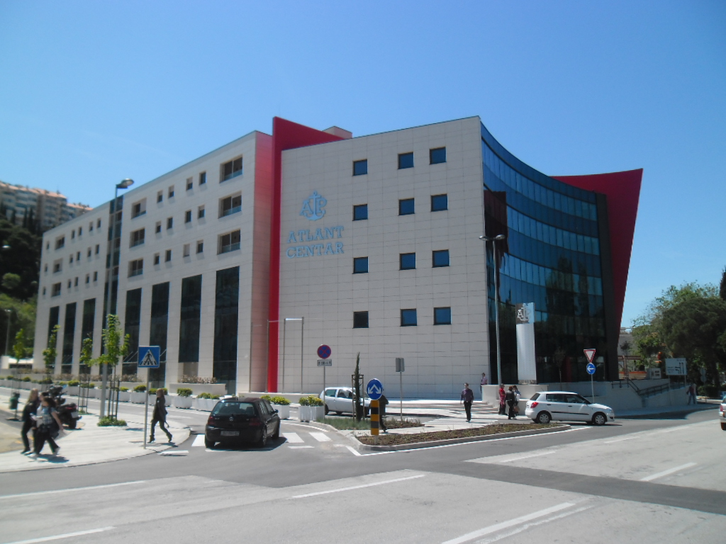 zgrada Atlantske plovidbe, Dubrovnik